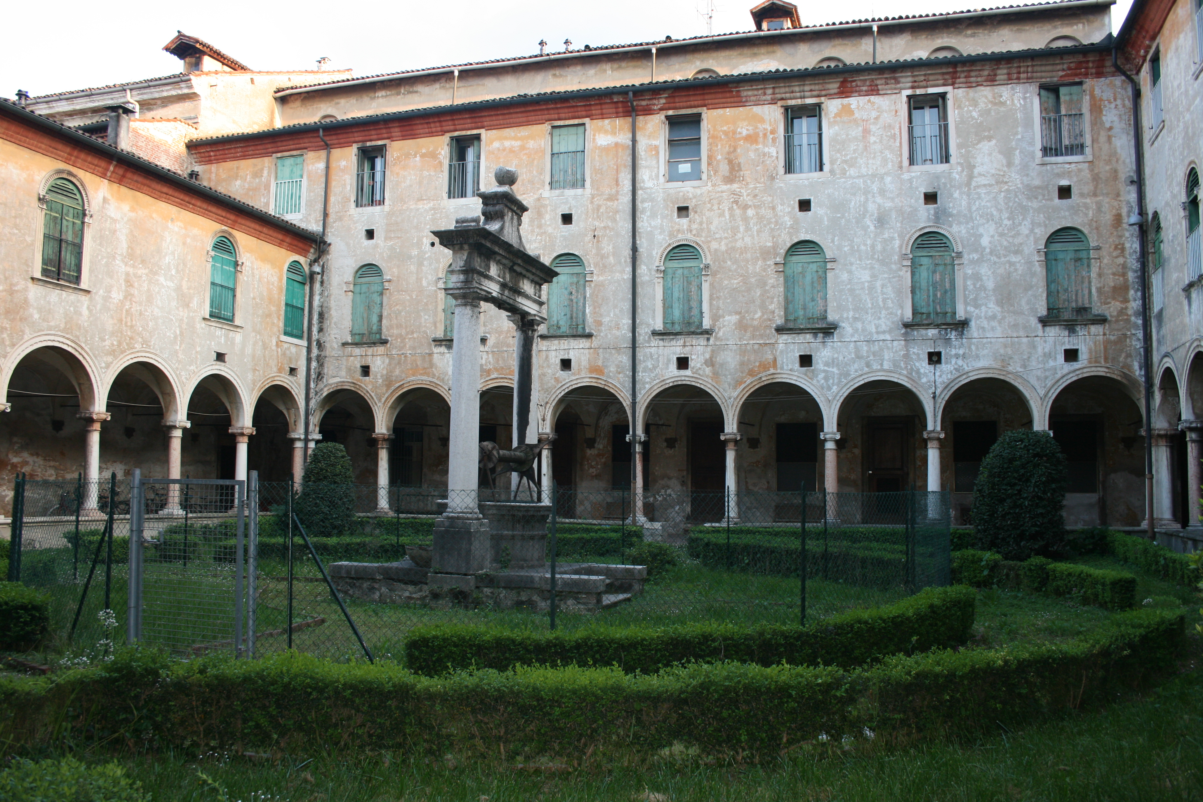 Chiesetta di San Rocco-VI Chiostro